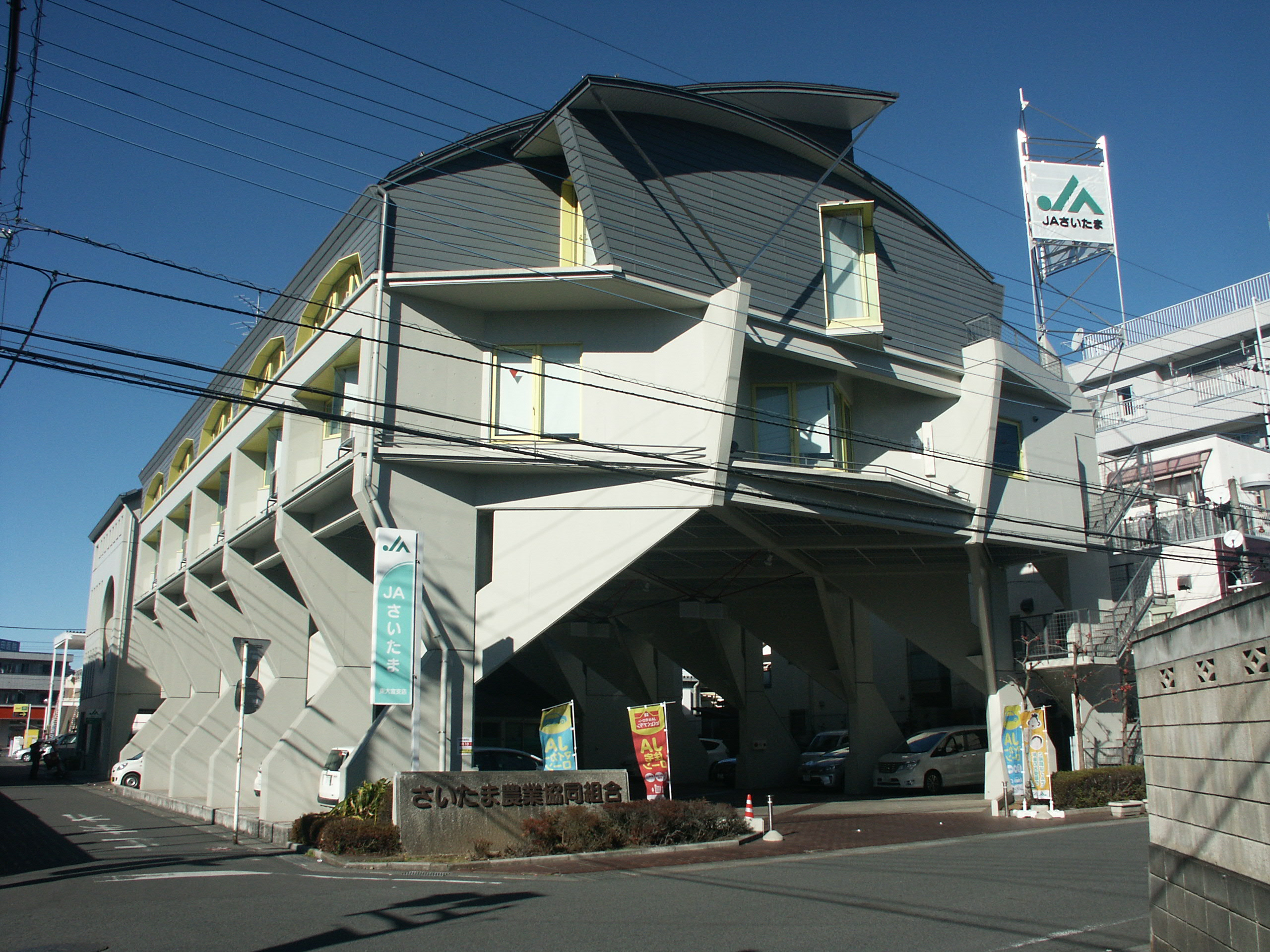 埼玉県さいたま市見沼区に所在するさいたま農業協同組合本店